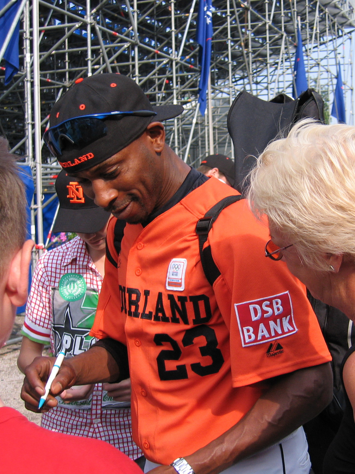 Johnny Balentina tijdens de WK 2005